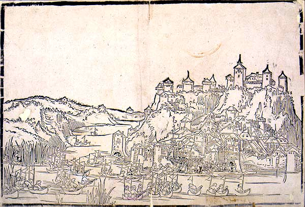 Holzschnitt der Belagerung von Belgrad durch Süleymann I. 1521, Herausgegeben von Wolfgang Resch 1521